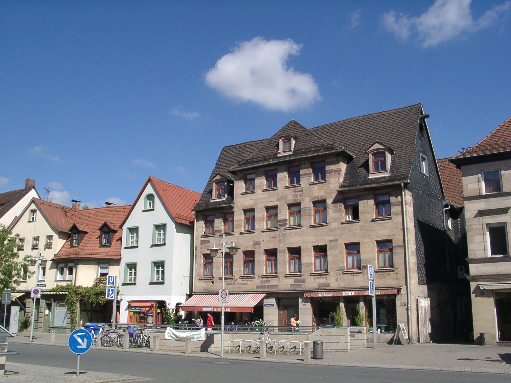 Fürth